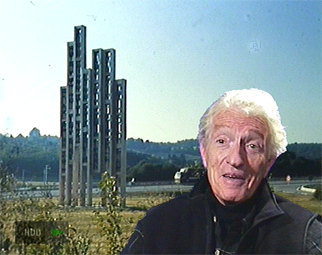 Portrait de Gérard Koch